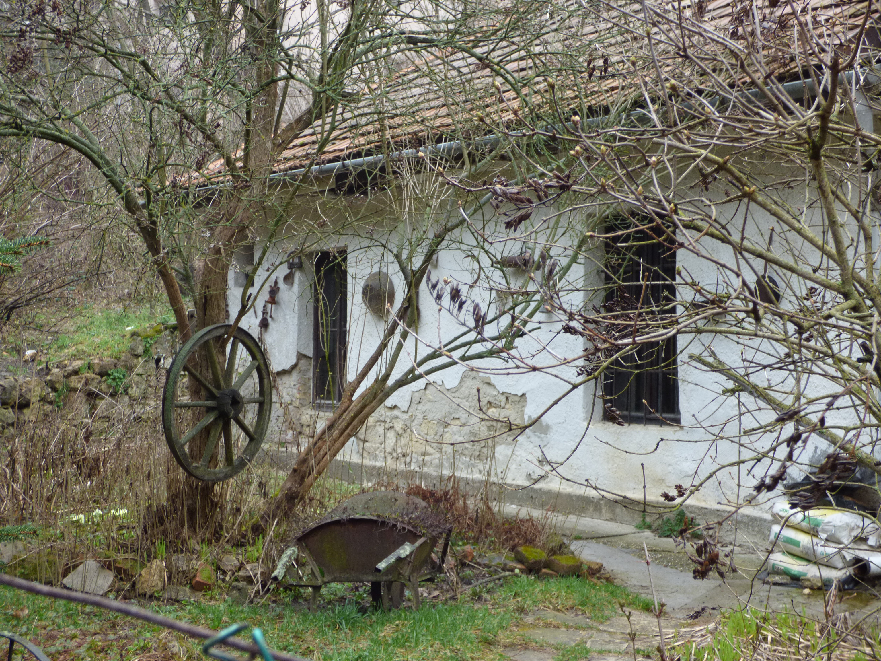 Régi ház a Csillagvölgyi utcában